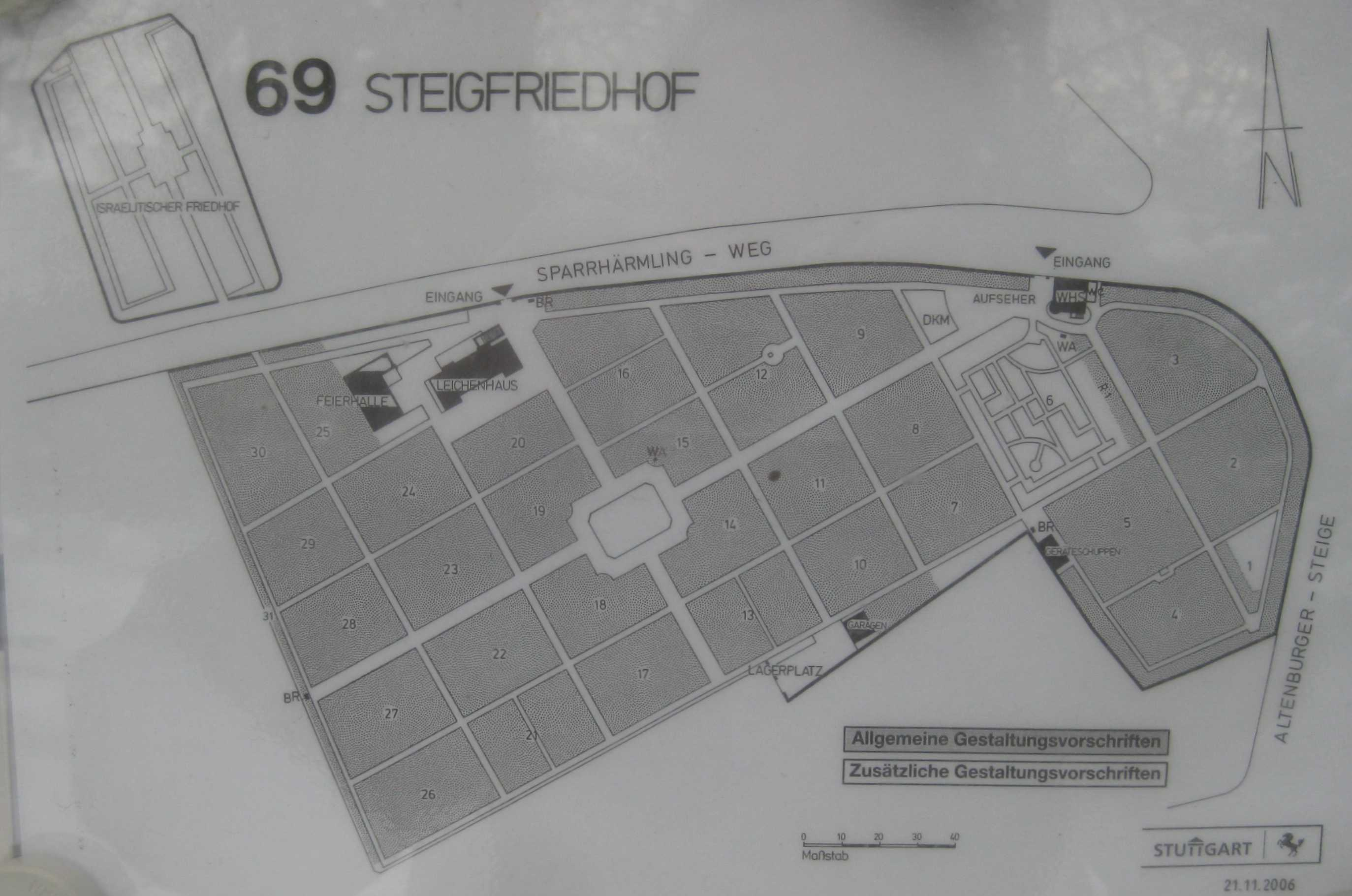 Aushangplan des Steigfriedhofs in Stuttgart. – Abkürzungen: BR = Brunnen, DKM = Denkmal (Ehrenmal für die Opfer der beiden Weltkriege von Emil Kiemlen), R1 = ?, WA = Wasserstelle, WHS = Wohnhaus.